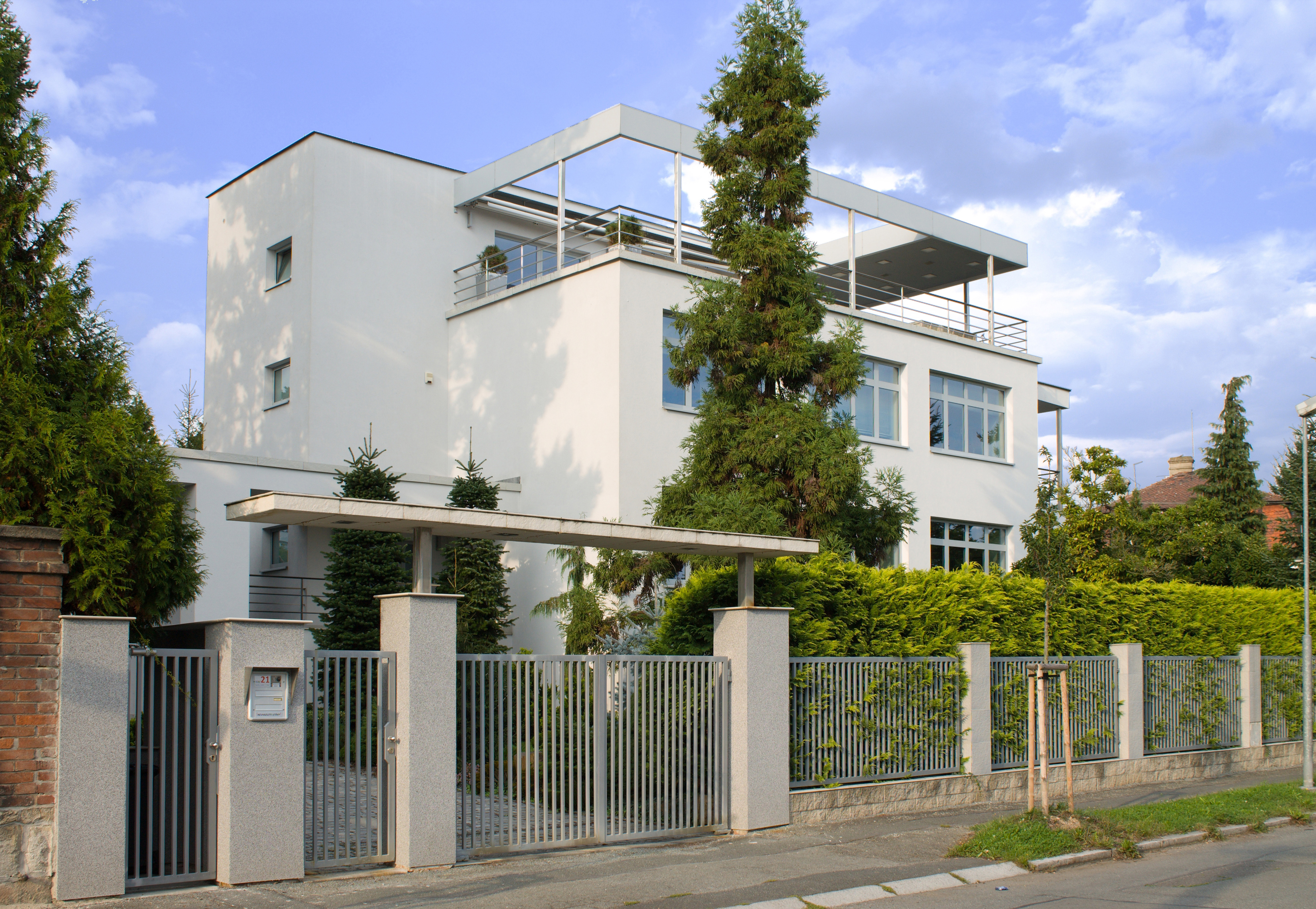 Karoliny Světlé 21, Plzeň 1-Severní Předměstí, Karolíny Světlé 558/21, Vlastina 558/9, Plzeň.